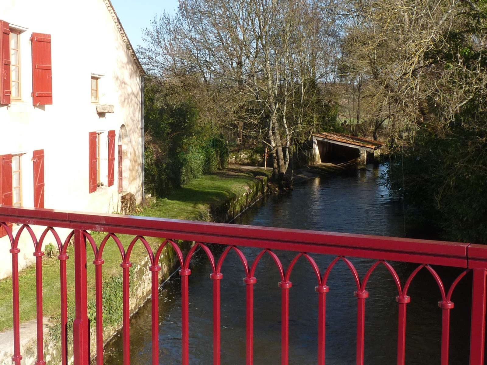 le Bandiat à Marthon, Charente, France